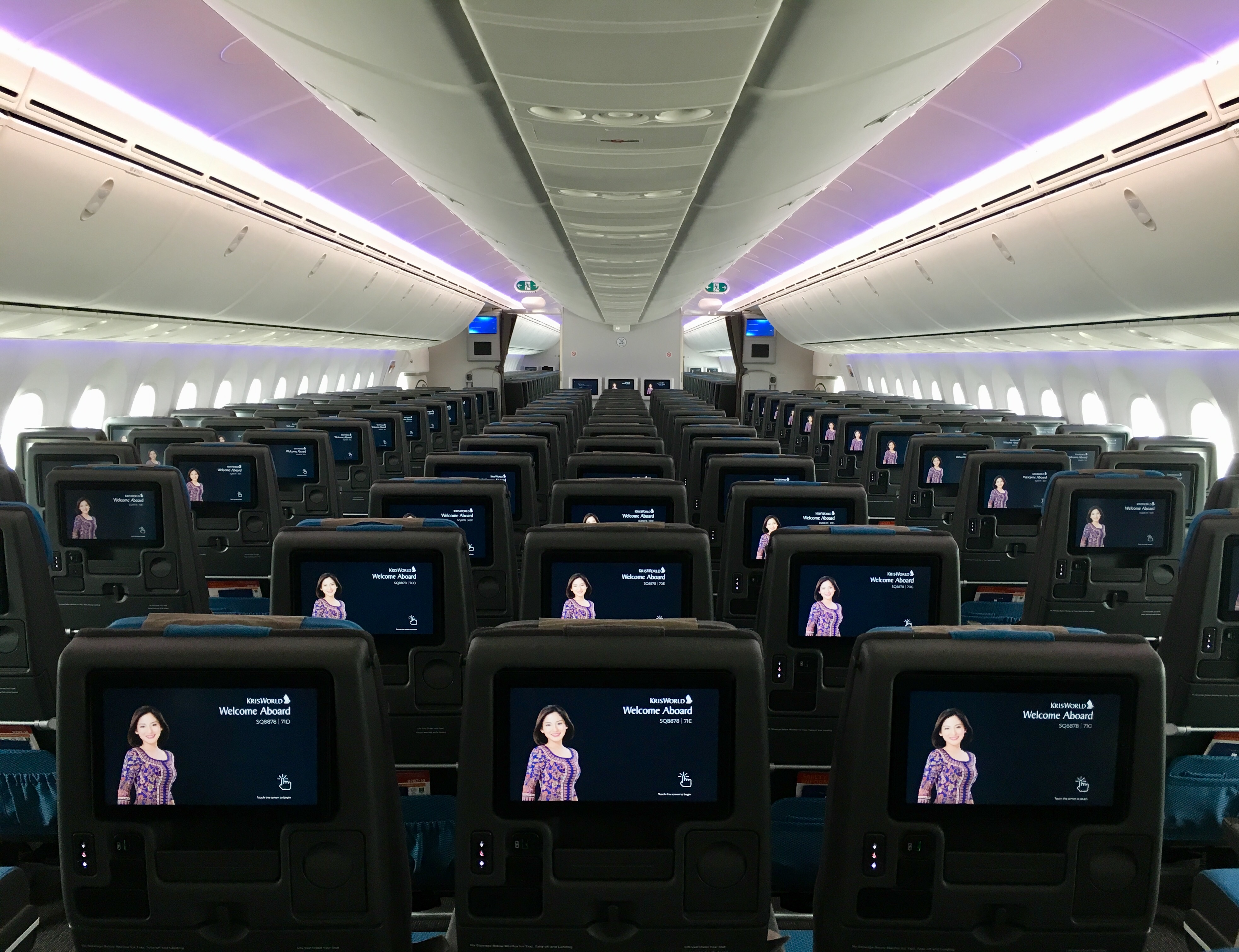 Singapore Airlines 787-10 regional economy cabin.